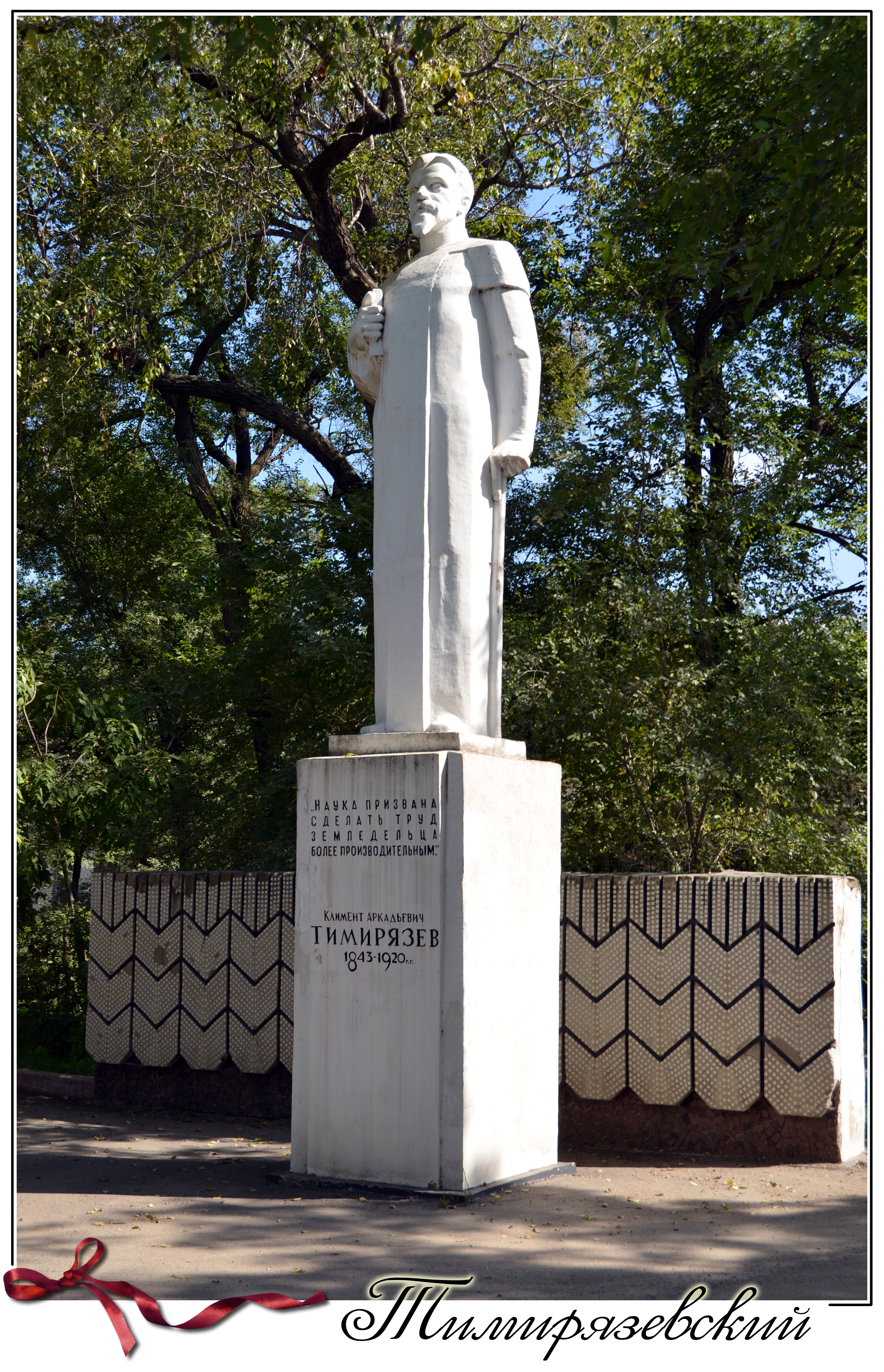 Памятник Клименту Аркадьевичу Тимирязеву.